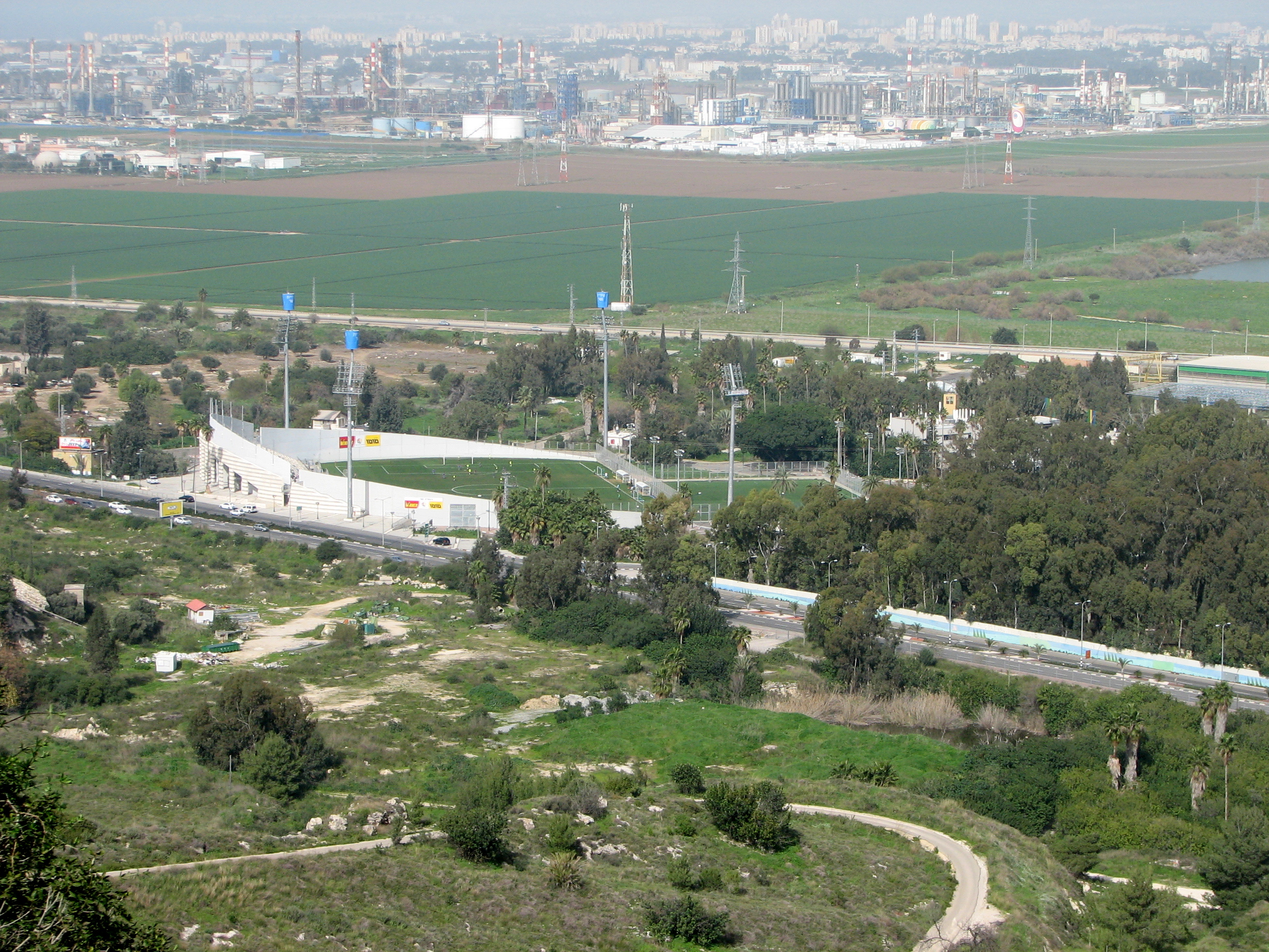 Green Paths, between Nesher - Yagur on Mount Carmel Israel. View from the path השביל הירוק בין העיר נשר וקיבוץ יגור, על הצלע הצפונית של הר הכרמל. מראות על השביל אמטדיון נשר לכדורגל